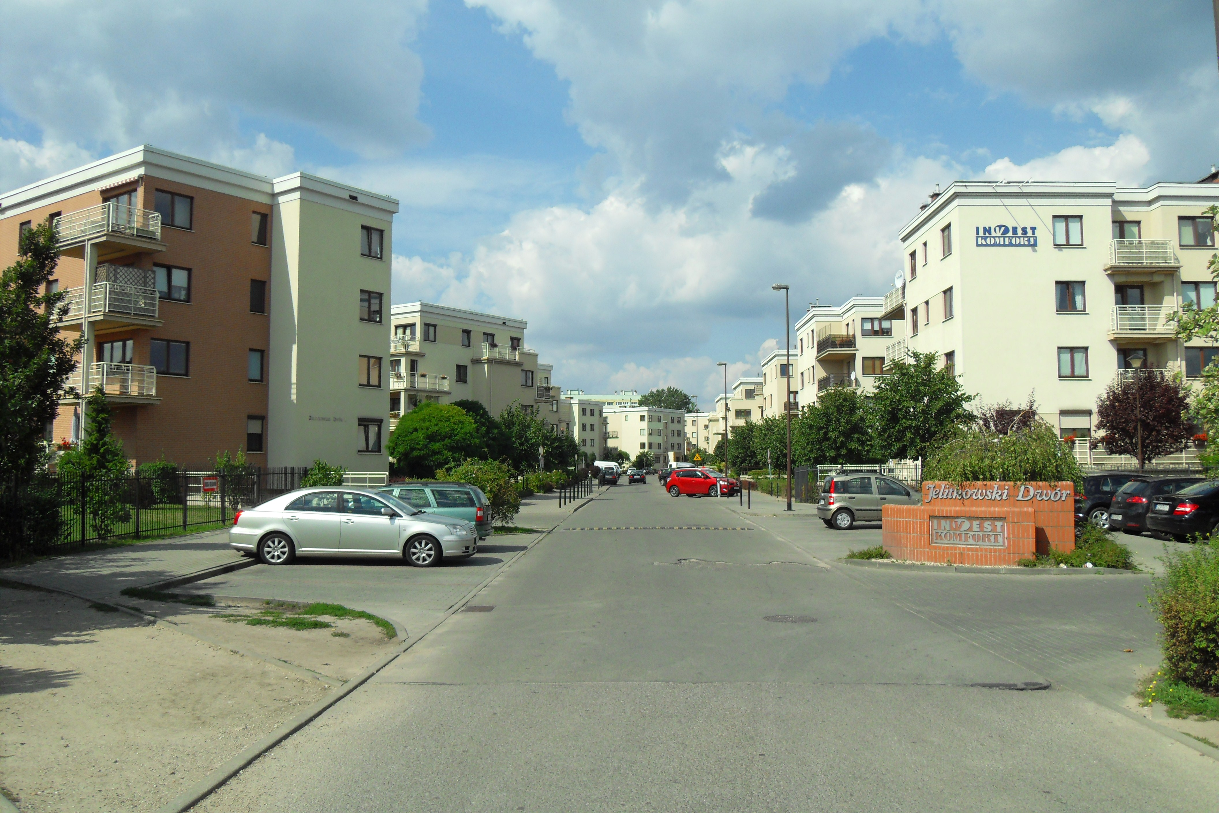 Gdańsk Przymorze Wielkie, ul. Jelitkowski Dwór.